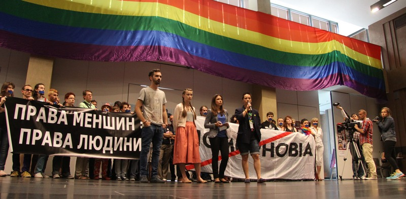 Учасники й учасниці III Маршу Рівності, призначеного на 2-й день VII Нацконференції ЛГБТ-руху та ЧСЧ-сервісу України, 04.07.2014